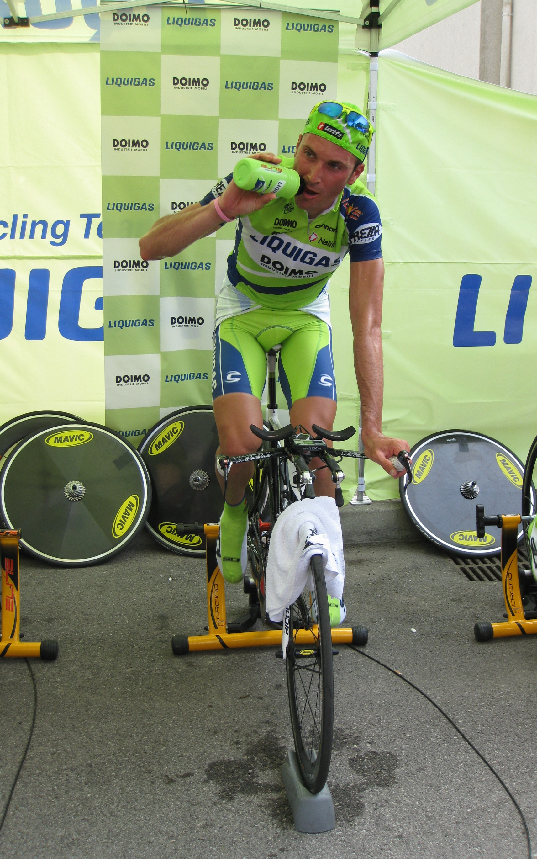 Giro d'Italia 2009 - Lido di Venezia - Ivan Basso